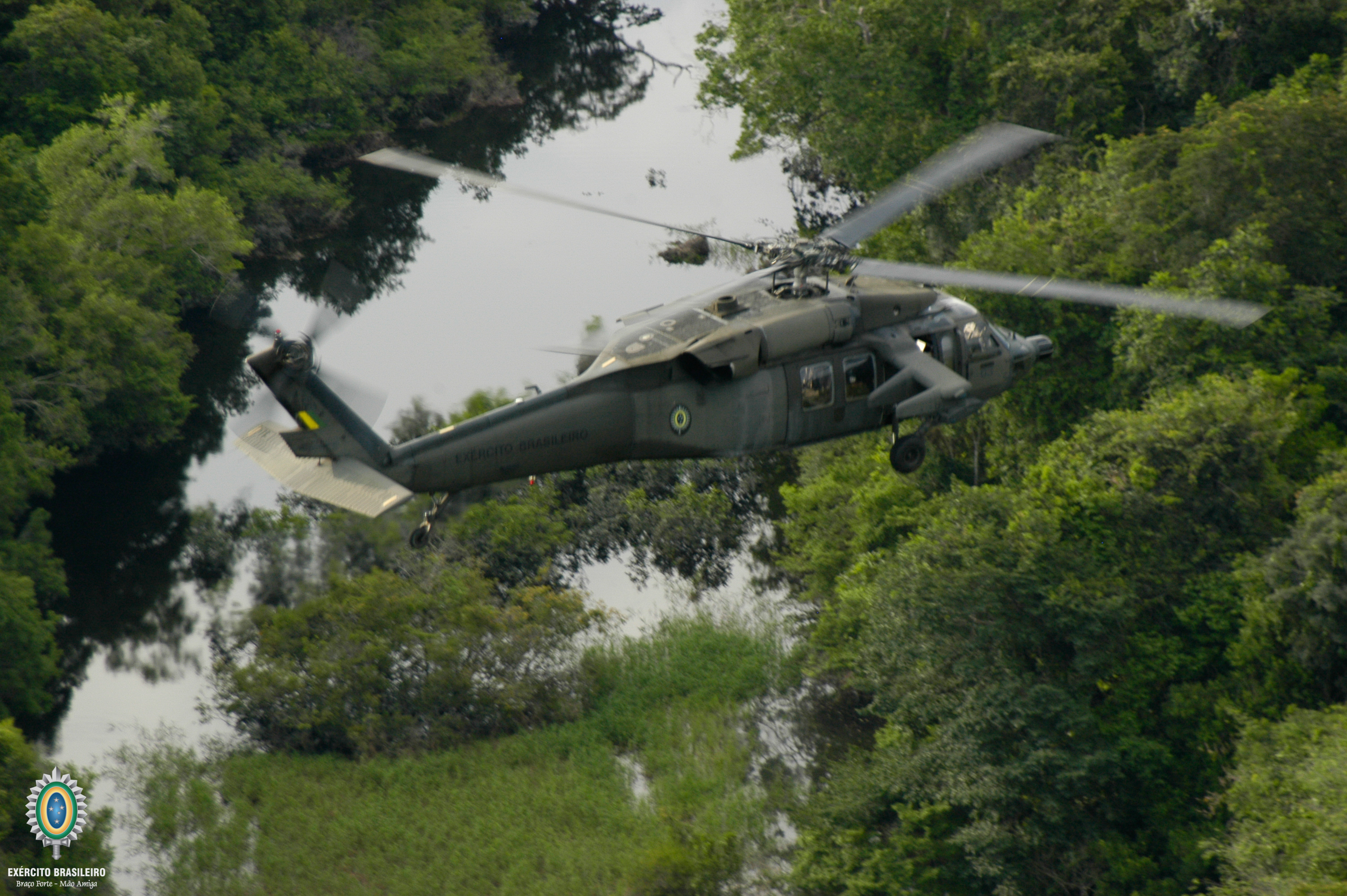 Selva, guerra na selva,combatente, Exército, solado, indio